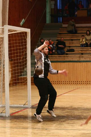 Narodni hazena - brankar